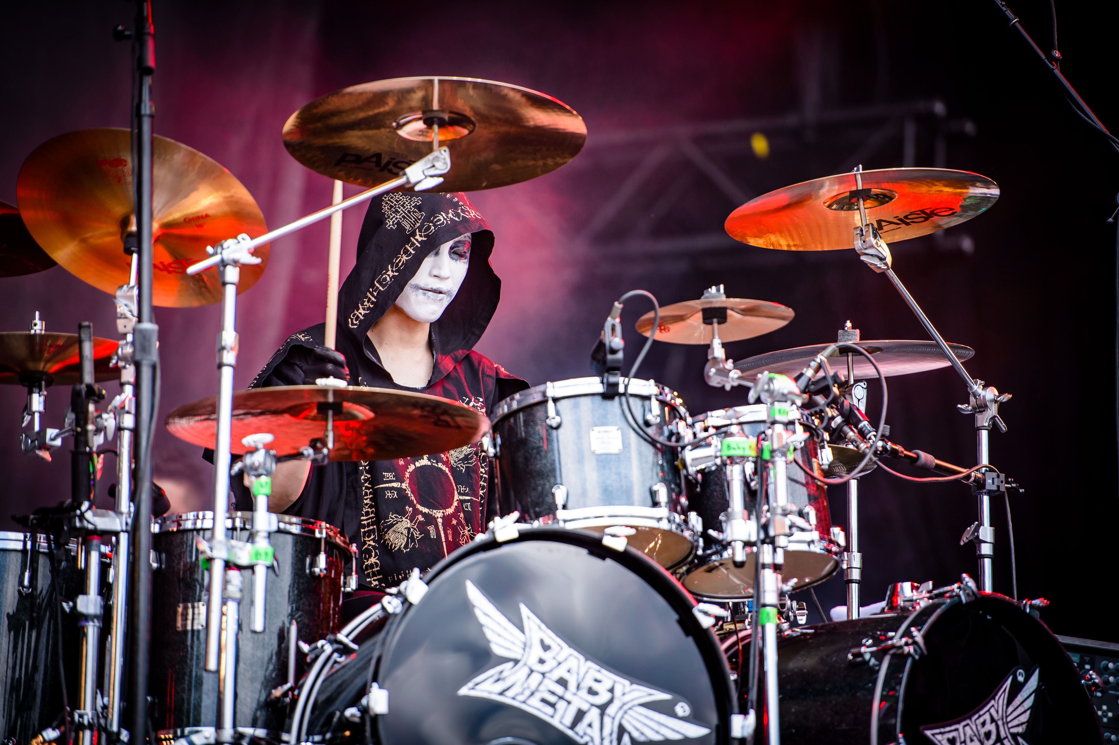 'Rock im Park 2018; Zeppelinfeld Nürnberg': 'Baby Metal'